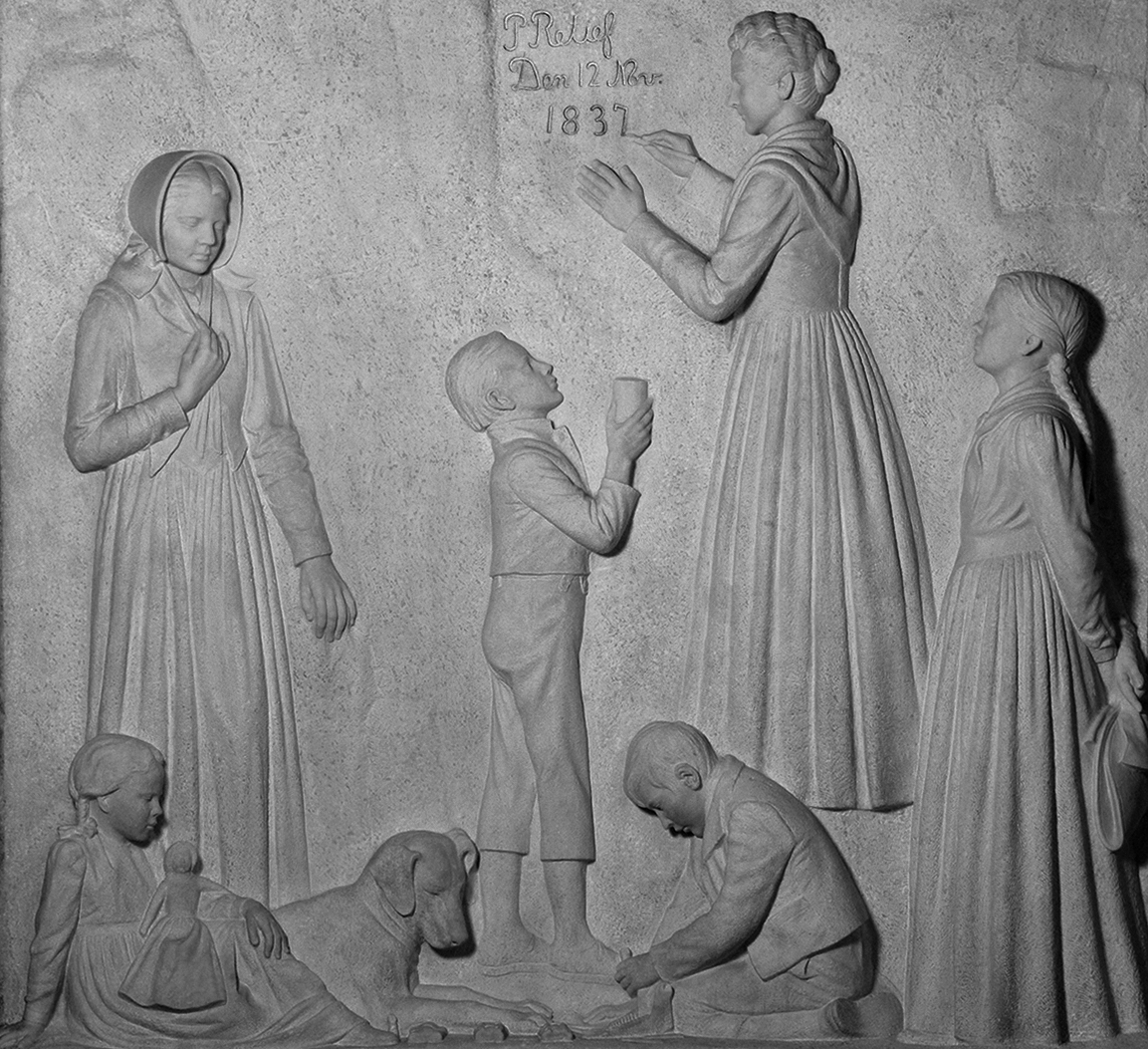 Voortrekkermonument friespaneel Nr 10